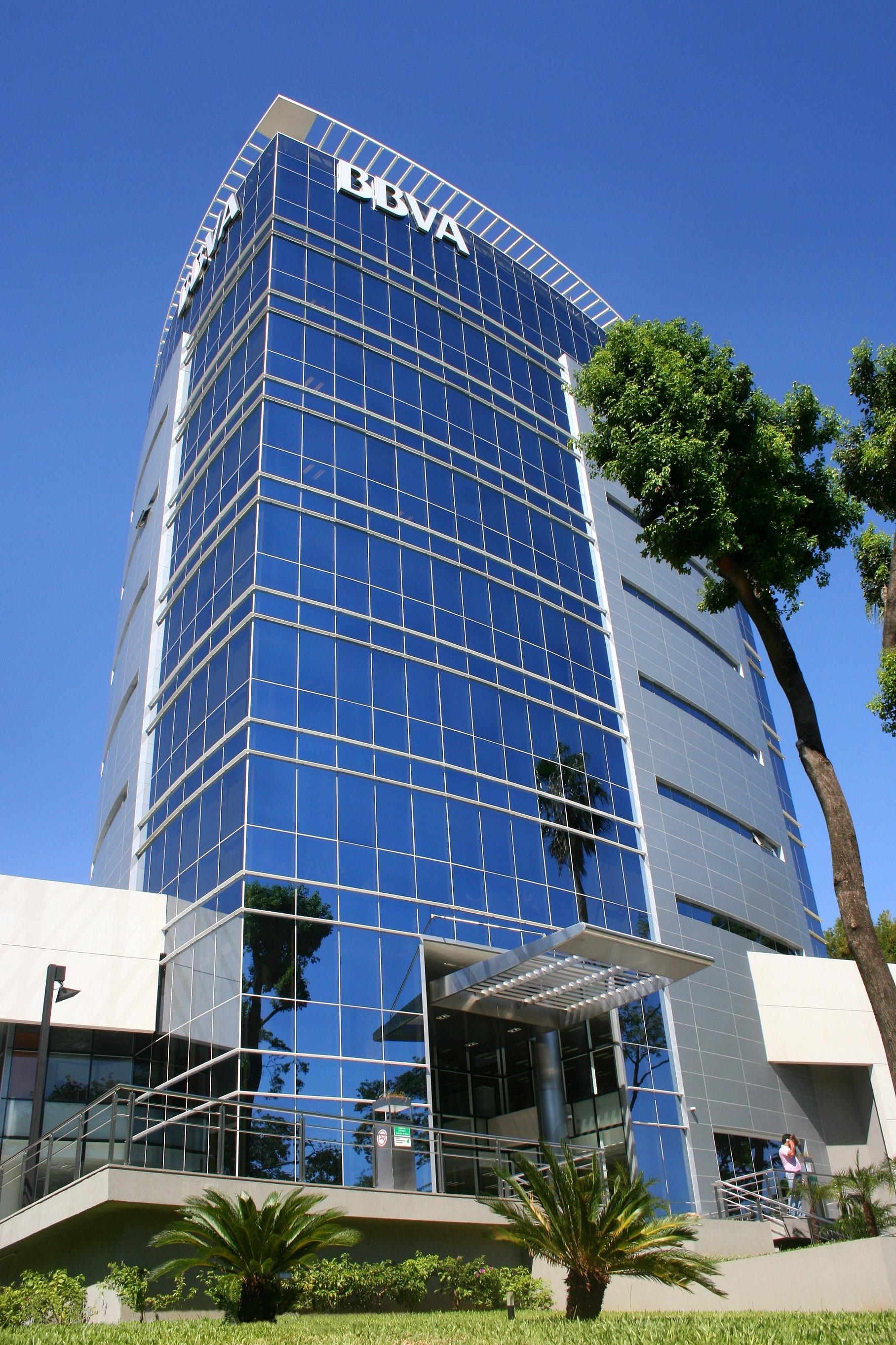 Edificio sede del Banco Bilbao Vizcaya Argentaria en el barrio Villa Morra de Asunción.